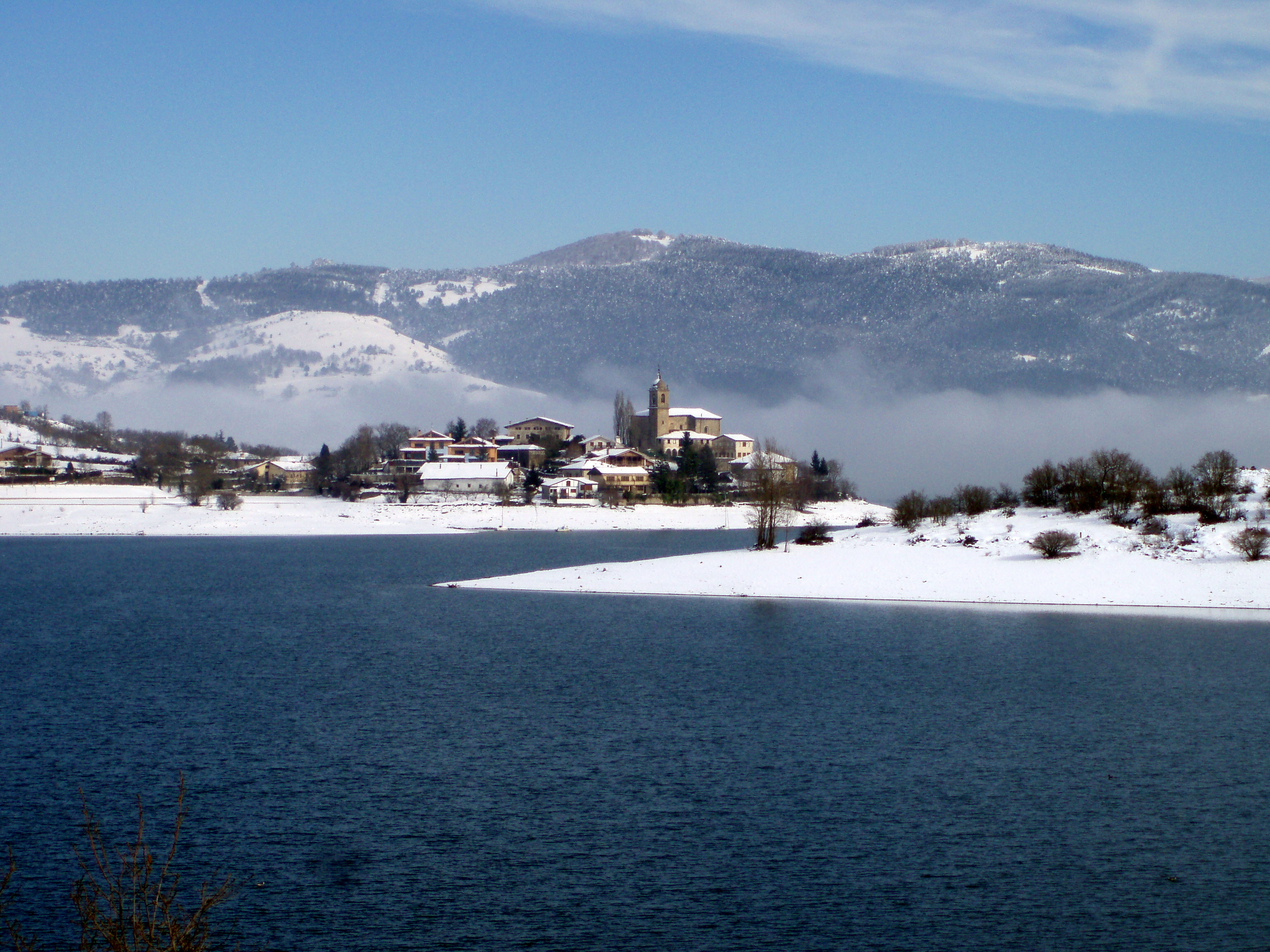 Uribarri-Ganboa